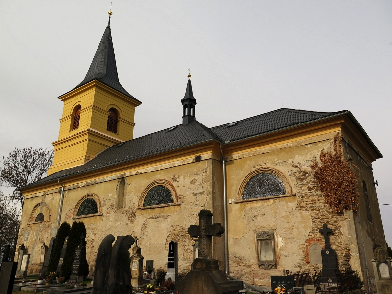 Kostel Božího těla, Křečhoř.